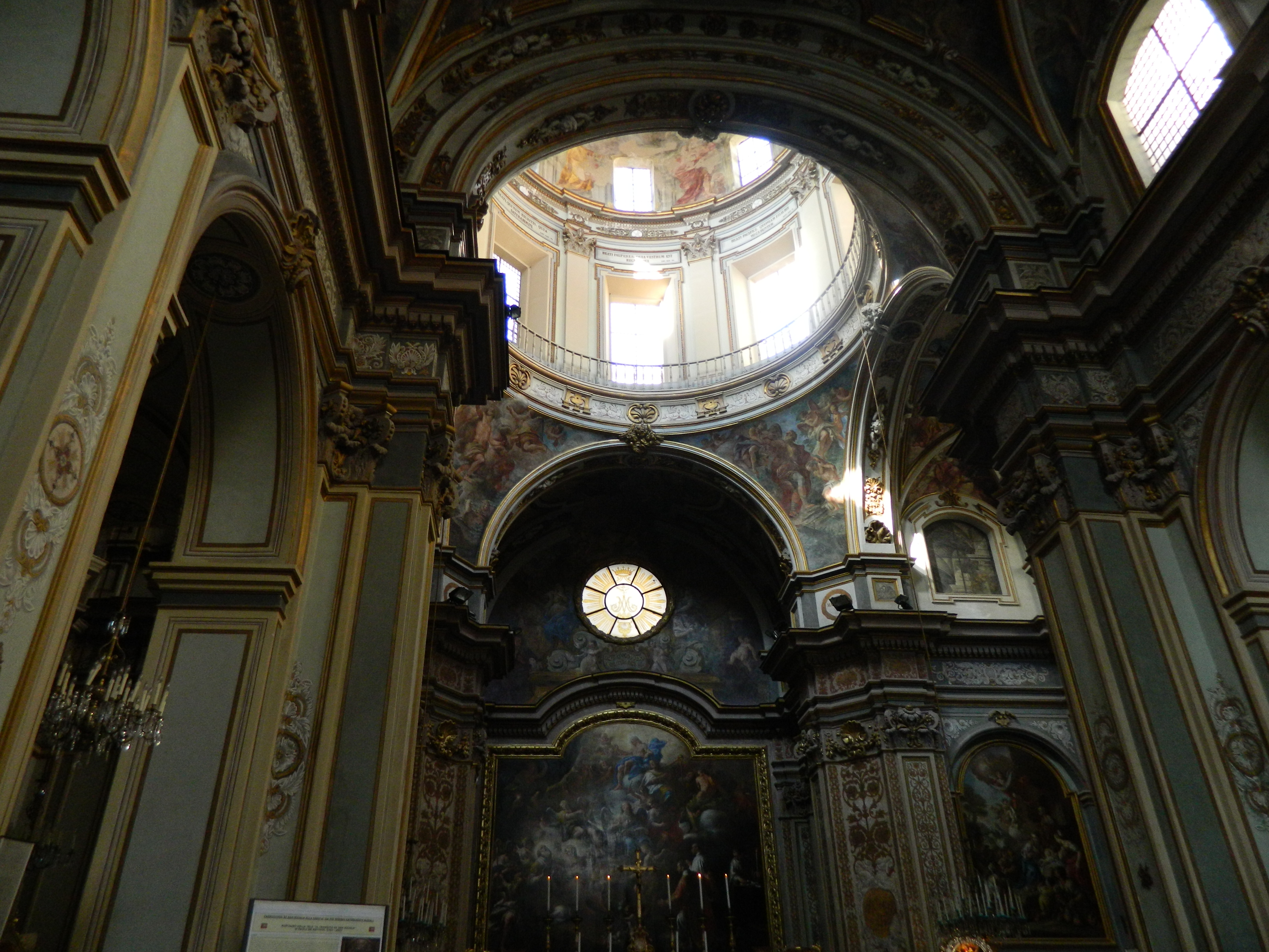 Interno della Chiesa di San Nicola alla Carità (Napoli)